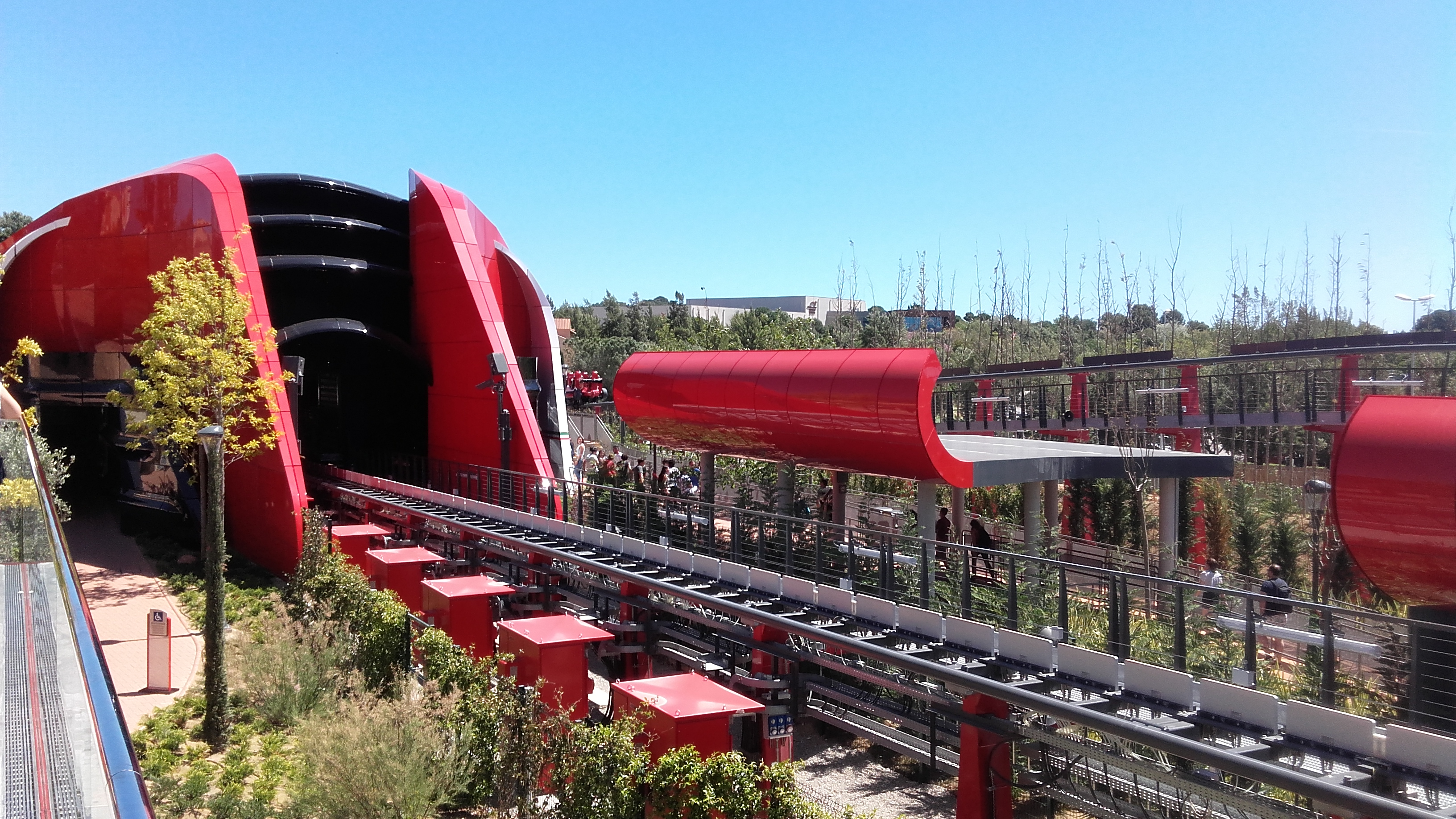 station